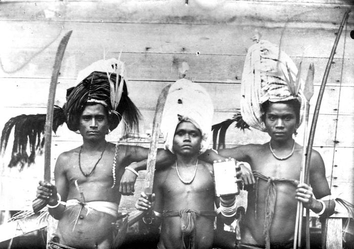 Repronegatief. Drie jonge Molukers van de Tanimbar-eilanden met hoofdtooien, speren en klewangs